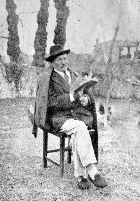 Asturian poet Pin de Pría, circa 1920-1926